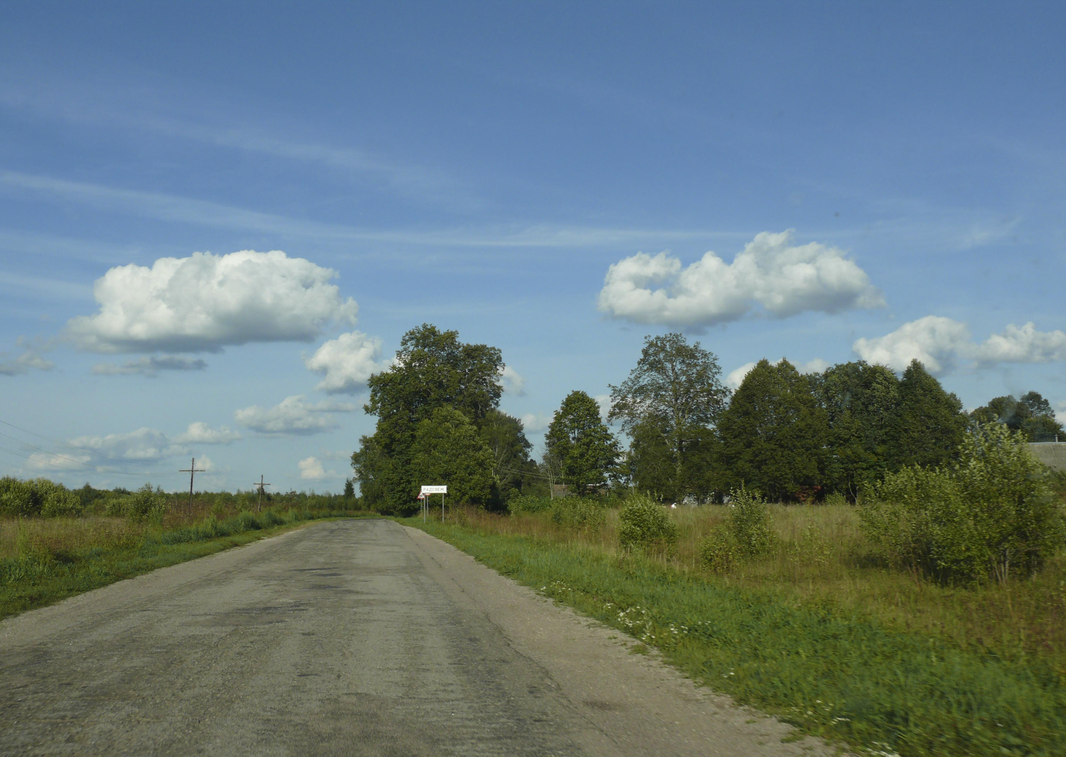 Деревня Радовеж Батецкого района Новгородской области